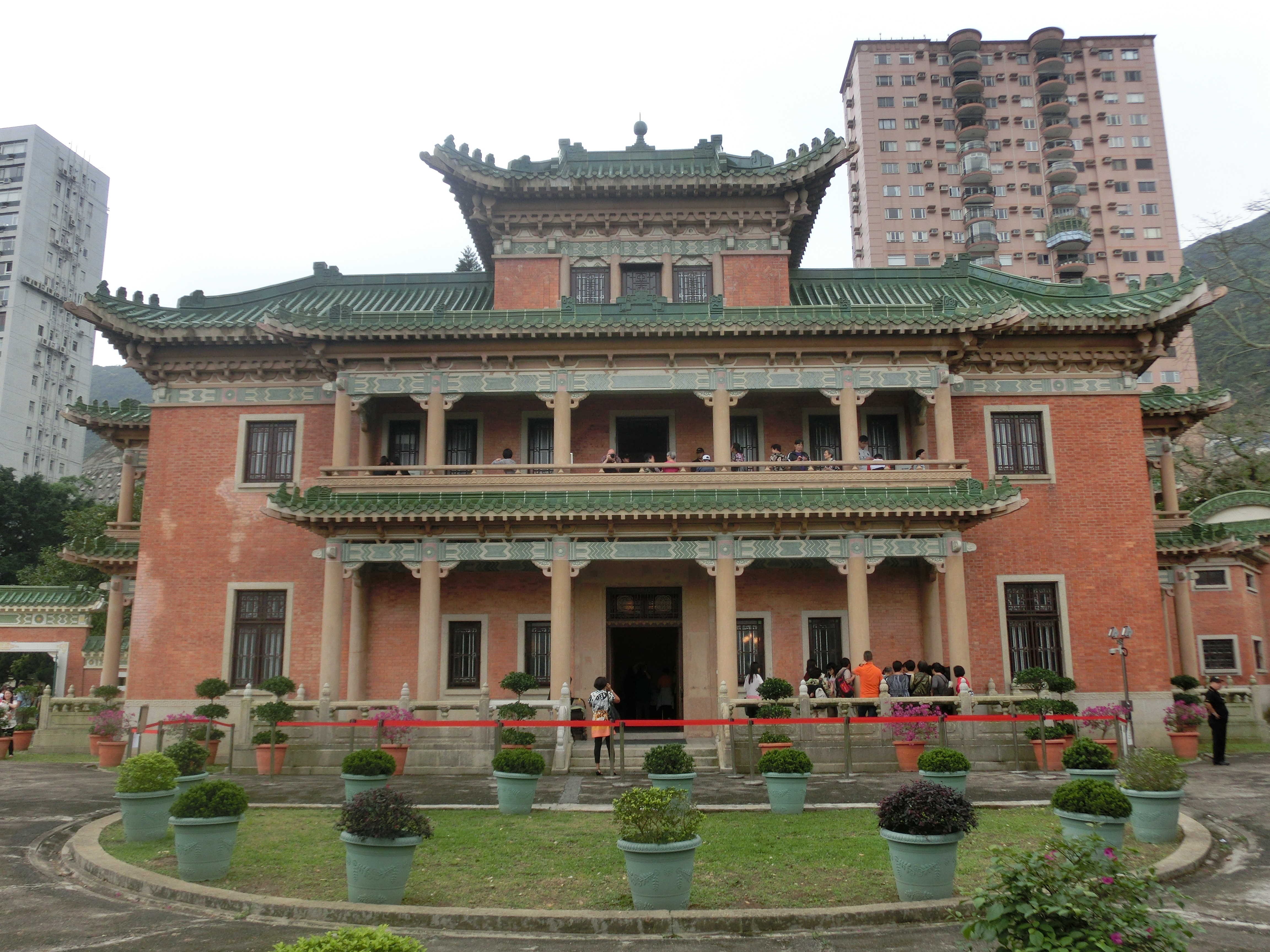 景賢里 Main entrance facade at King Yin Lei, looking South. Ground floor contains main entrance hall, reception rooms, and public spaces; First floor contains bedrooms and wrapping veranda (on opposite side); and partial Second Floor includes balcony (embedded in the roof from this view)